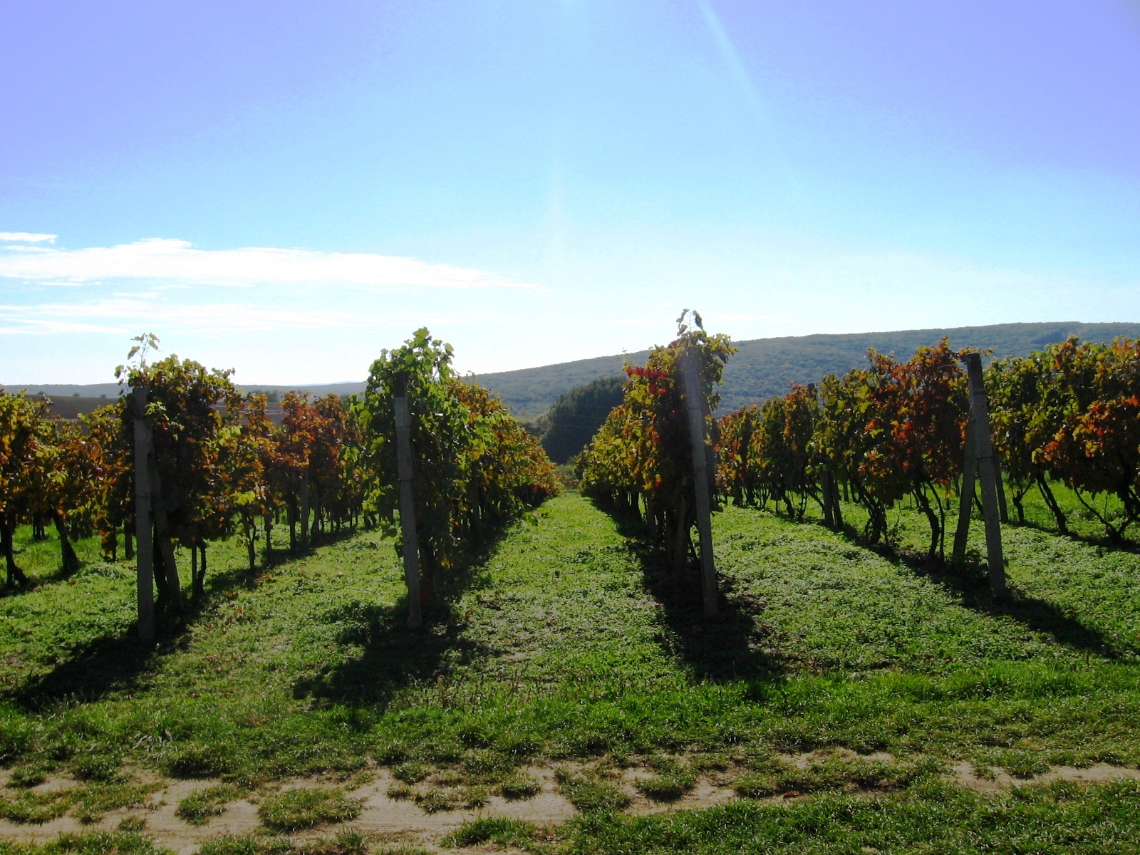 Vinice v Kloboukách u Brna